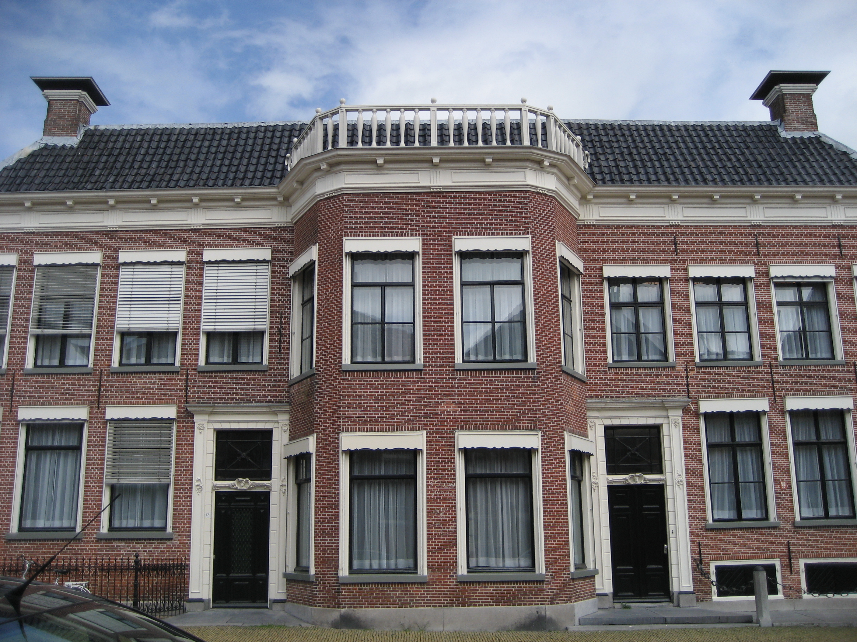 Grietmanshuis Sneek, Marktstraat 17-19